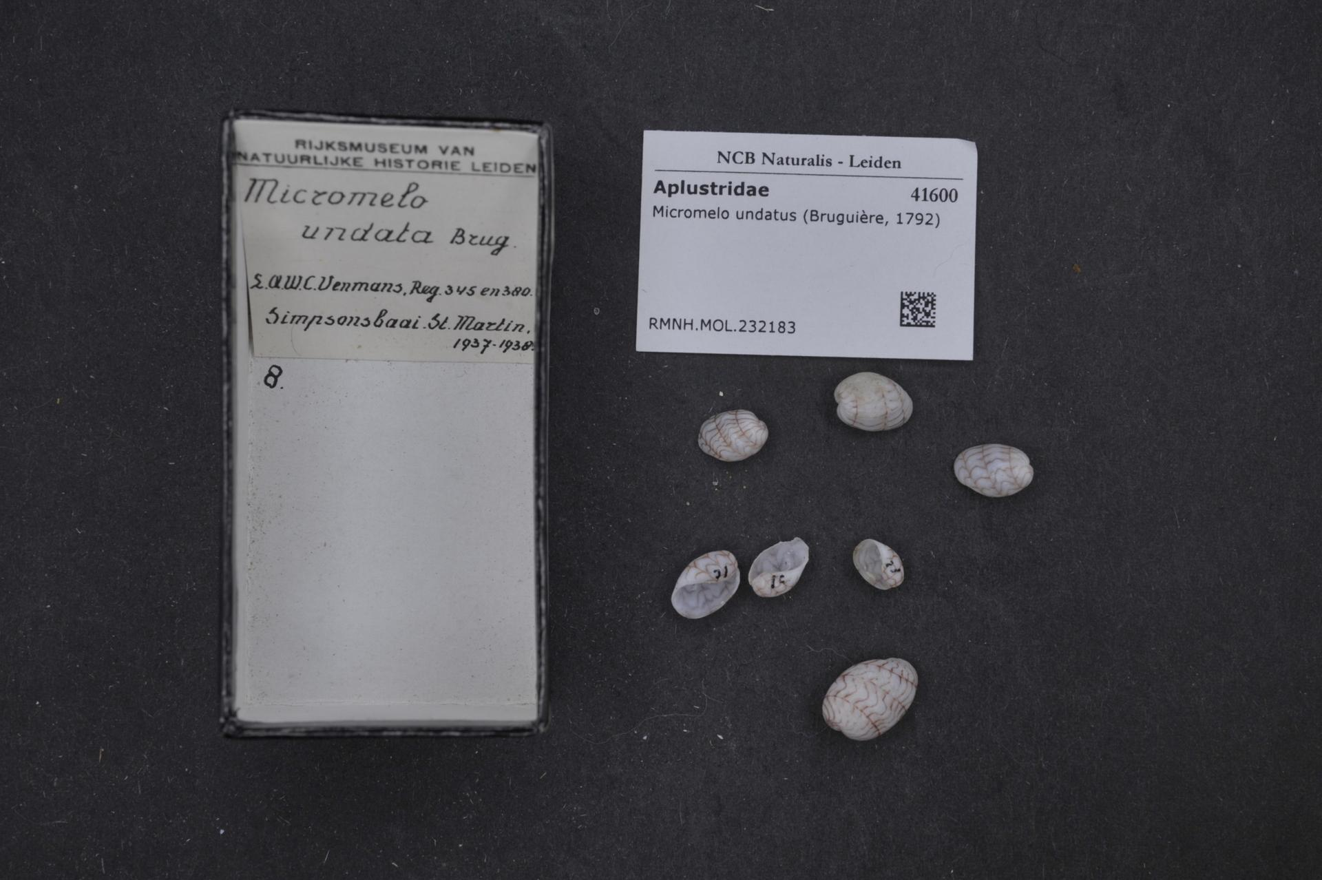 Micromelo undatus (Bruguière, 1792)